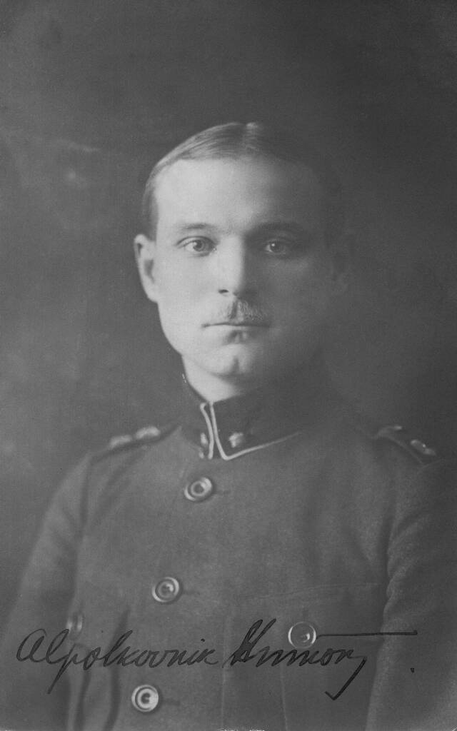 Alampolkovnik Arnold Hinnom 1920. aastal.